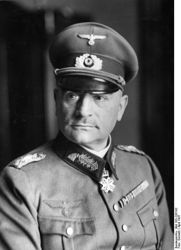 Friedrich v. Rabenau Generalleutnant Dr. phil.h.c. Friedrich v. Rabenau Am 16.April wird im Heeresarchiv Potsdam, dem Gebäude der ehem. Kriegsschule auf dem Brauhausberg, die Errichtung der Heeresarchive durch eine kurze militärische Feier festlich begangen. Seit dem 1.April d. J. hat das Heer eigene Archive. Zum Chef der Heeresarchive wurde Generalleutnant Dr. h. c. von Rabenau ernannt, ihm unterstehen die Heeresarchive Dresden, München, Potsdam und Stuttgart. Scherl Bilderdienst, 13.04.1937 Fot. Dorneth 4705-37 [Porträt Friedrich von Rabenau] Abgebildete Personen: Rabenau, Friedrich von Dr.: Generalleutnant, Chef der Heeresarchive, Deutschland